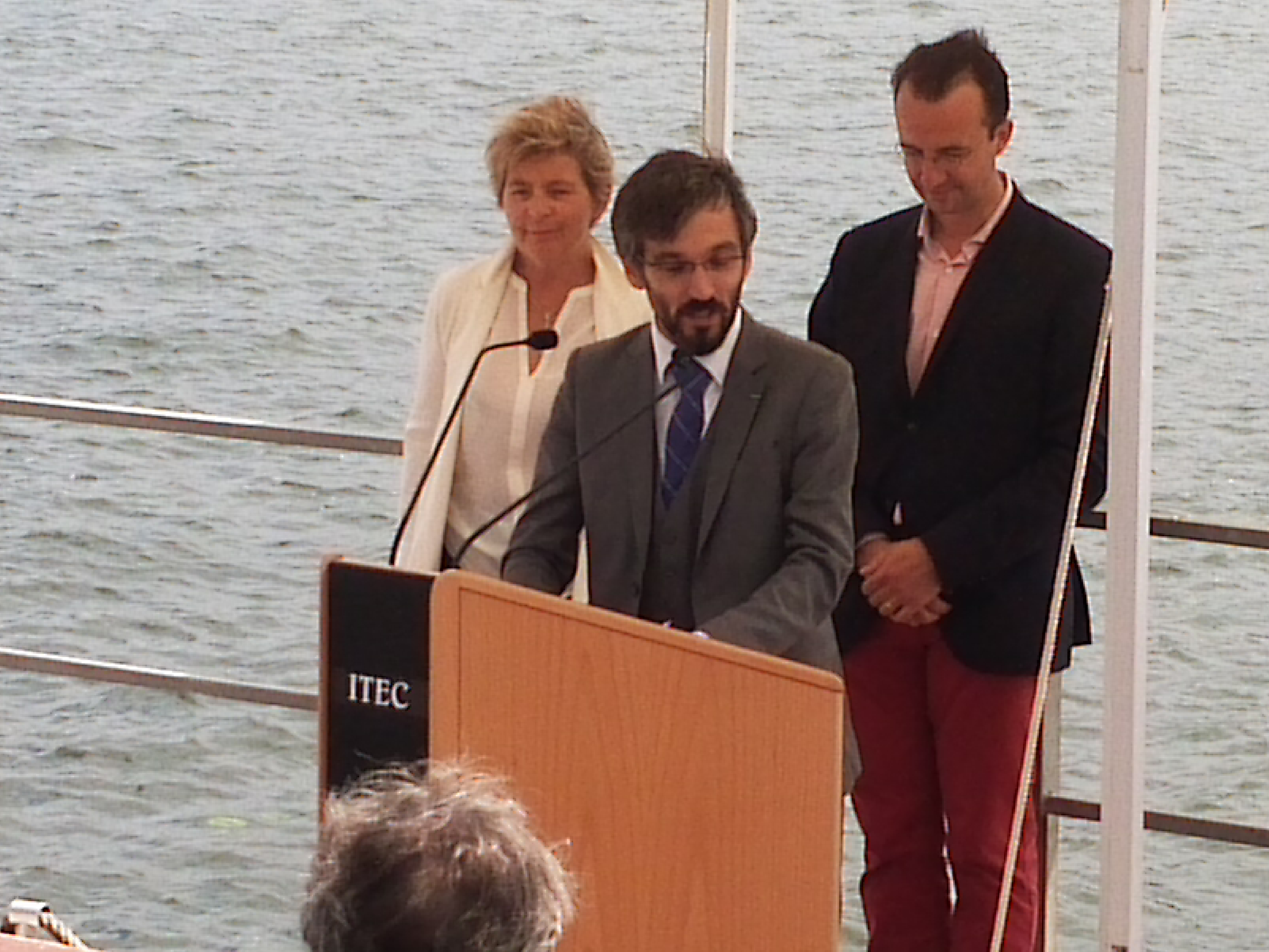 Cérémonie de présentation des armoiries de Bourgogne-Franche-Comté à Saint-Jean de Losne (15-7-2017). Discours de Rémi Mathis, héraldiste et historien, concepteur des armoiries. Derrière lui, Marie-Guite Dufay, présidente de la région, et Edouard Bouyé, directeur des archives départementales de la Côte d'Or.